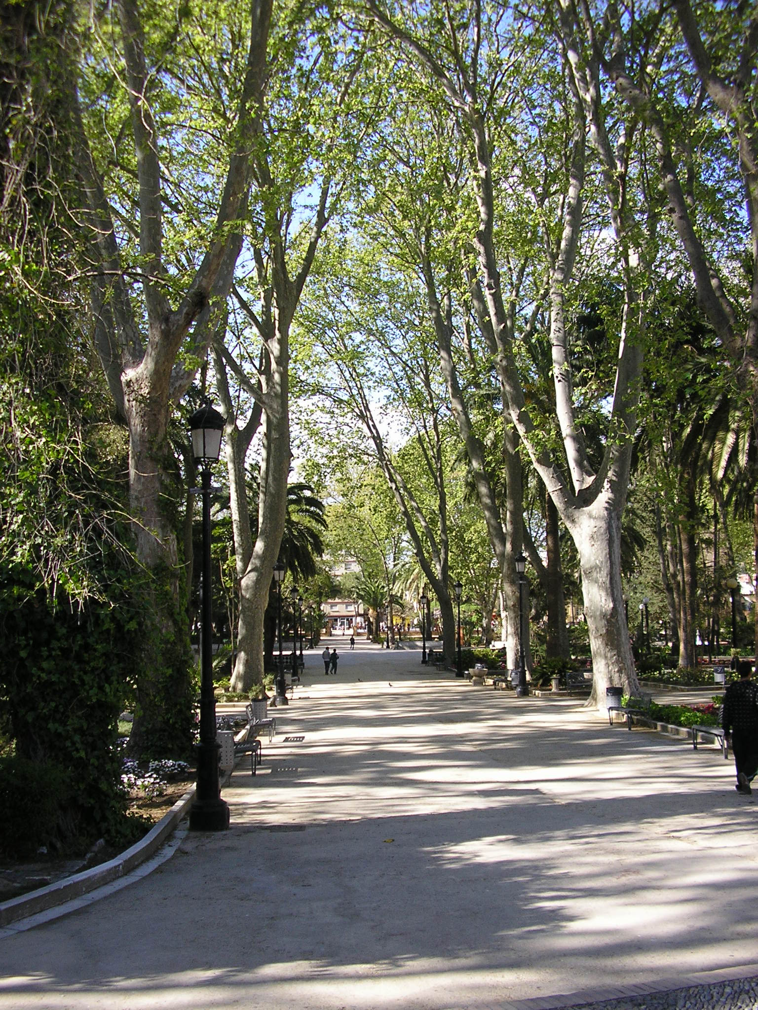 Parque María Cristina de Algeciras, Andalucía, España